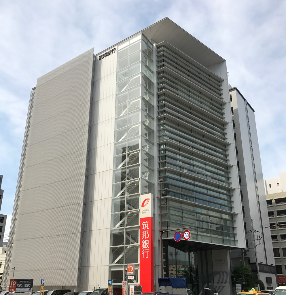 ちくぎん福岡ビルの外観